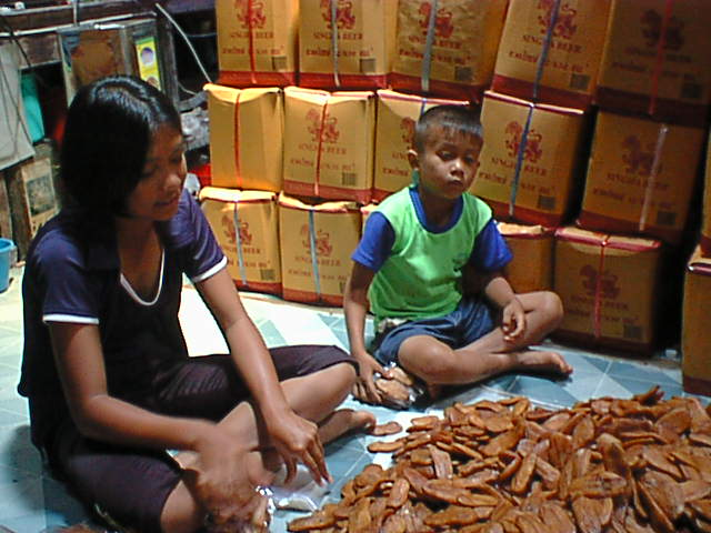 Cousins Ootsa Ruasamran and Jaras Chaimueangchuen packaging bananas at a Bang Krathum banana factory